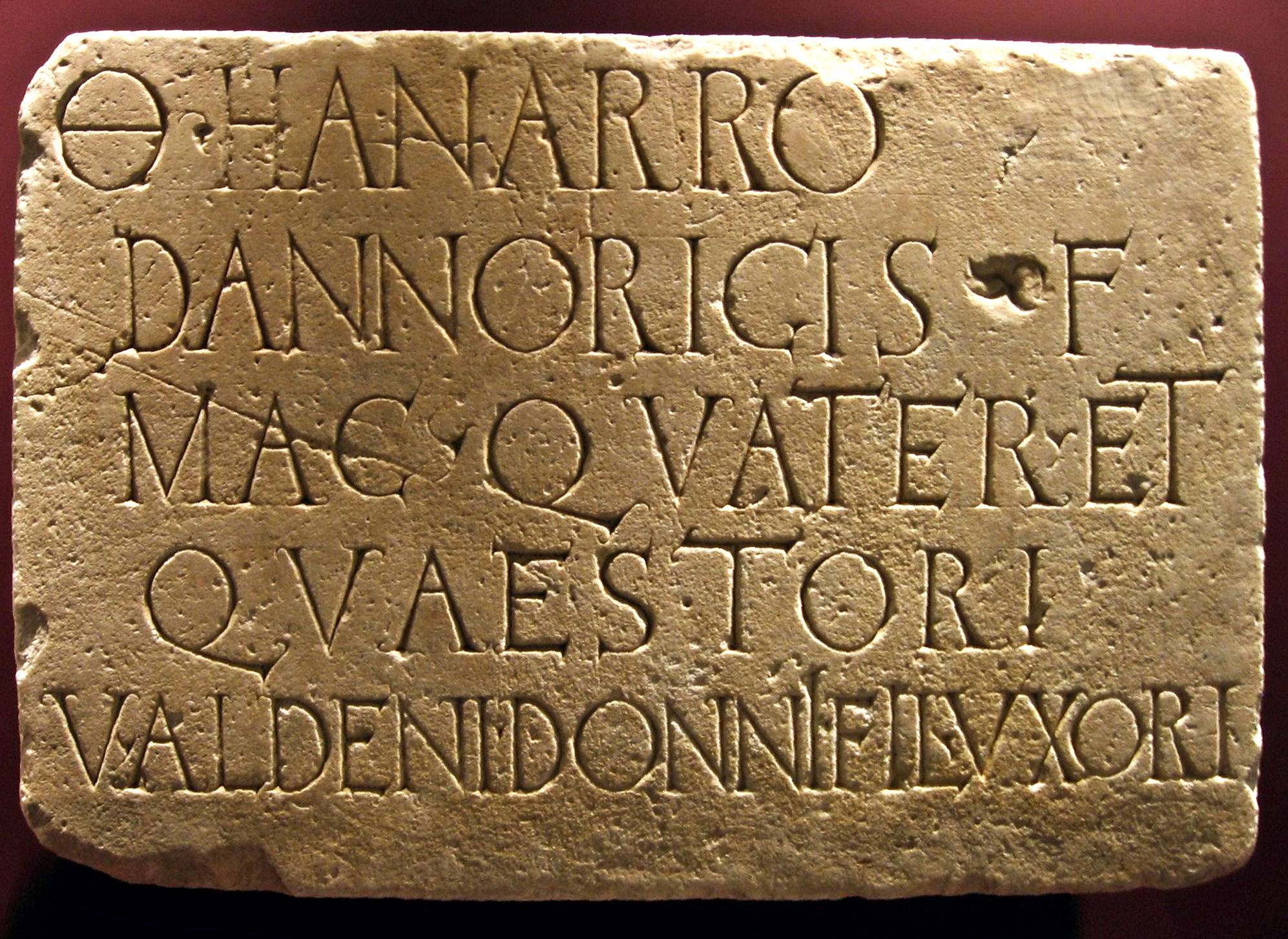 Musée Saint-Raymond (Toulouse, France) : Inscription dédiée au défunt Hannarus, fils de Dannorix qui fut quatre fois magister (d'un pagus ou d'un vicus) et questeur, et à son épouse Alden, fille de Donnus. Datant du Ier ou IIe siècleOrigine : elle fut découverte au XVIIIe siècle sur un tombeau à Saint-Lizier (Ariège). Elle a fait partie de la collection d'Antoine Rivalz. n° inv. Ra 258 Référence : CIL XIII, 5